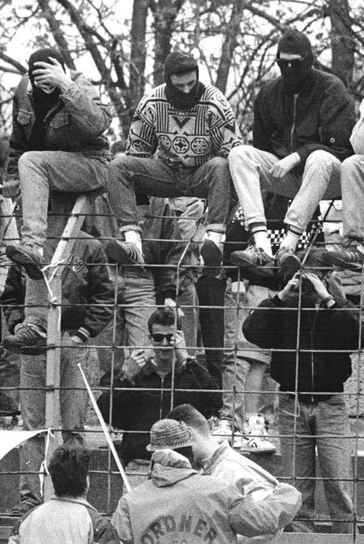 ADN-Kasper- 8.4.90- Jena: Fußball-Oberliga- 20. Spieltag- Teilweise vermummt bestiegen sogenannte Fans aus Berlin trotz Warnung der Polizei das Schutzgitter während des Spiels FC Carl Zeiss Jena gegen FC Berlin am 7.4.90. Trotz eines großen Polizeiaufgebotes kam es zu Ausschreitungen, die nicht nur Freunden des runden Leders eine Gänsehaut über den Rücken jagten.